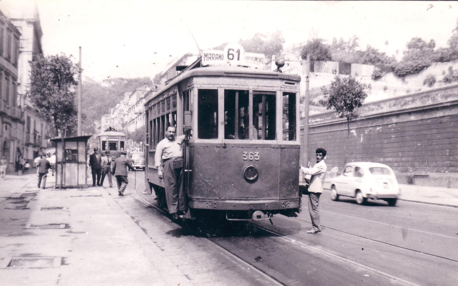 Tram Napoli - Marano